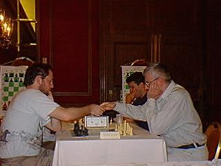 Suat Atalik